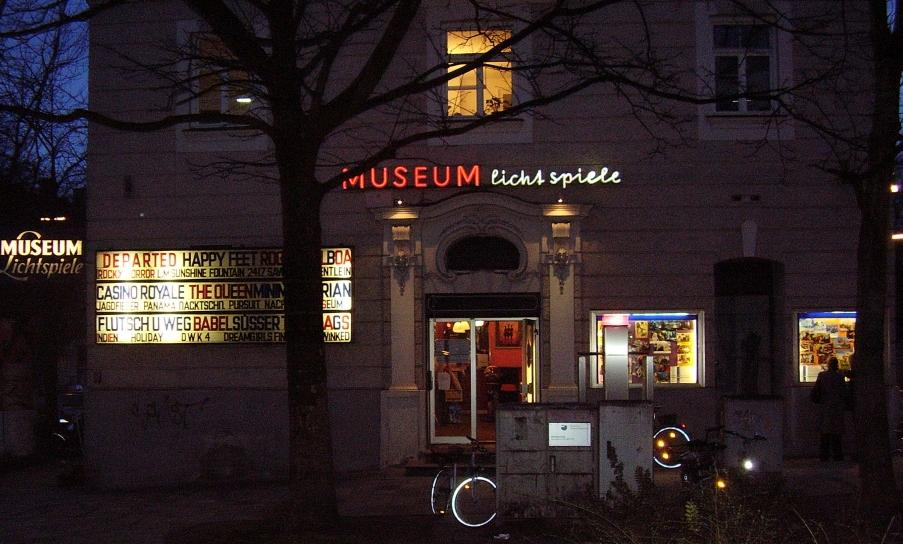 Museum Lichtspiele (Kino; engl.: Cinema in der Lilienstraße, München (Munich / Germany) (Hat seit dem 24. Juni 1977 den Kultfilm "The Rocky Horror Picture Show" regelmäßig im Programm und hält damit weltweit den Rekord)